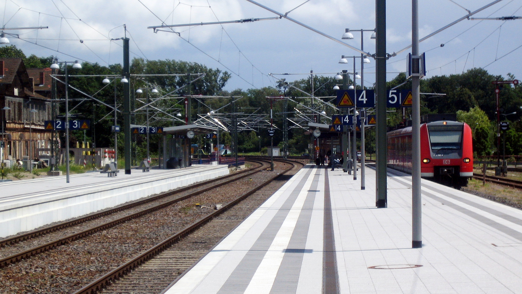 Bahnhof Germersheim im Juni 2007 nach seiner Modernisierung.